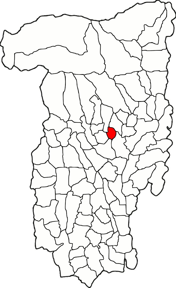 Lage der Stadt Băile Govora im Kreis Vâlcea (RO).